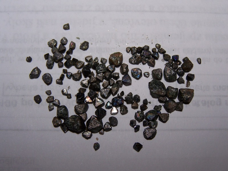 Magnetity z oblasti Sobotína.